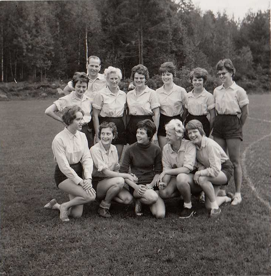 Syfabriken Gefa ABs damlag 1963, Öxabäck. Bild från Öxabäck IFs museum. Övre raden från vänster: Stina Andersson, Gunnar Wilhelmsson, Rut Oskarsson, Ingeborg Wilhelmsson, Kerstin Johnson, Marita Wilhelmsson, Margareta Johansson. Nedre raden från vänster: Helena Heldebring, Nelly Lindegårde, Lena Karlsson, Gunnel Wilhelmsson, Gun-Britt Andersson.